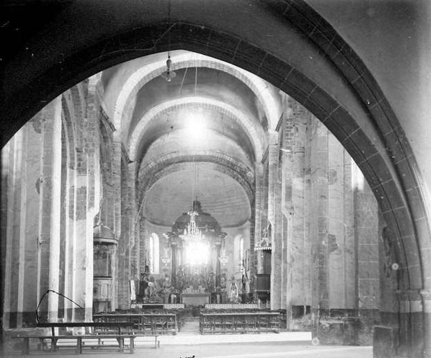 Interior de la catedral de Santa Eulàlia. Marcel·lí Gausachs i Gausachs (Entre 1920 i 1930)